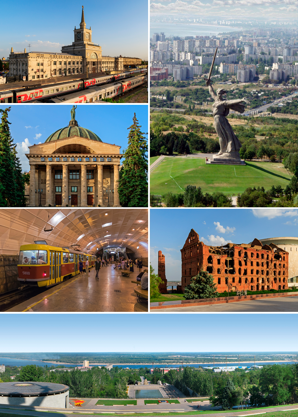 Коллаж для страницы о Волгограде из фотографий